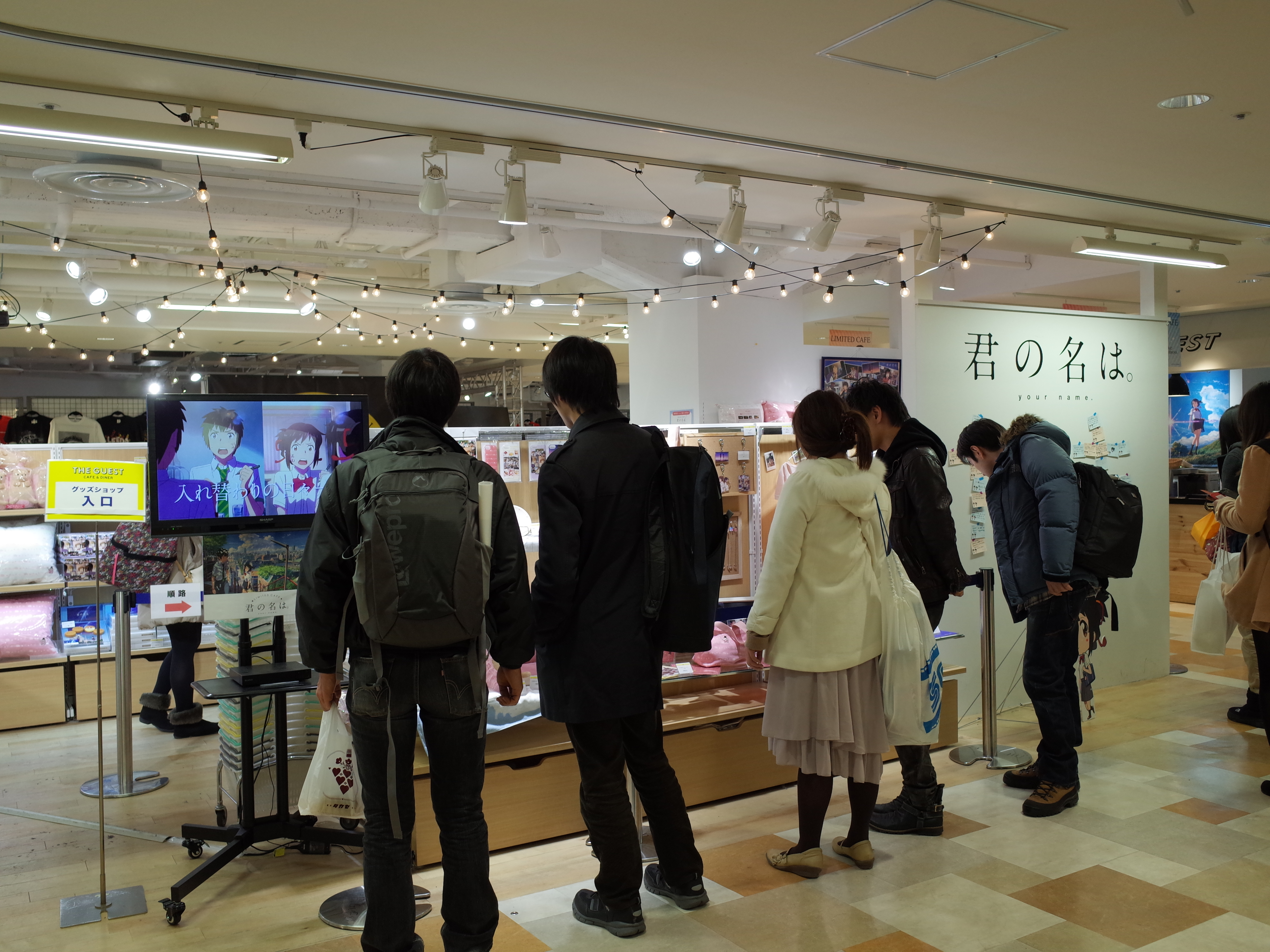 君の名は。カフェ